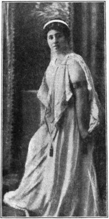 Griechische Frau, 19. Jahrhundert.